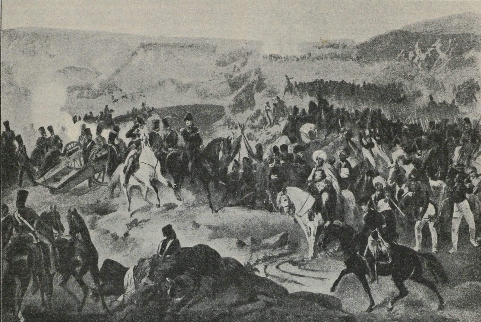 Бой под Кулевчей 30 мая 1829 г. (в момент взрыва зарядных фур). картины Коцебу, находящейся в Зимнем дворце.